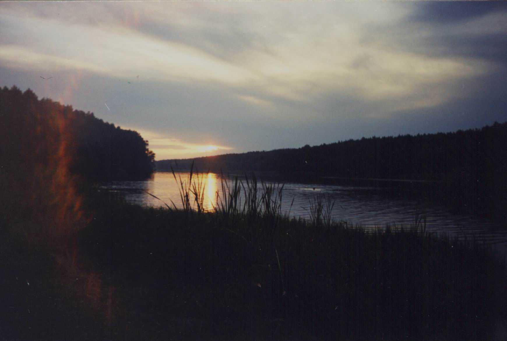 Река Вяча